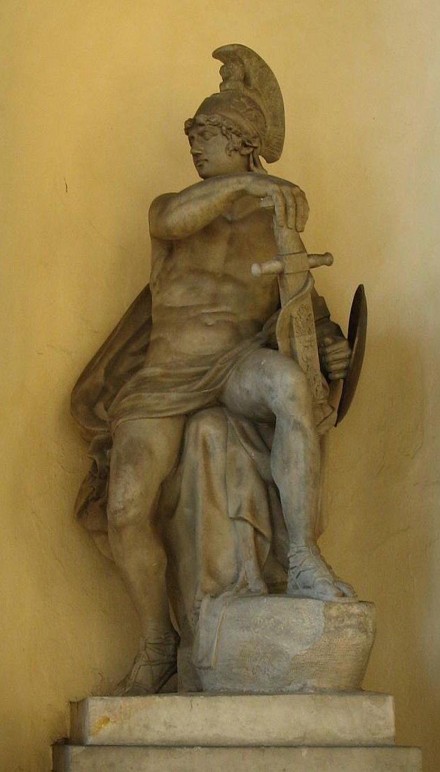 Statue des römischen Kriegsgott Mars am Brandenburger Tor in Berlin. Bildhauer Johann Gottfried Schadow [1]